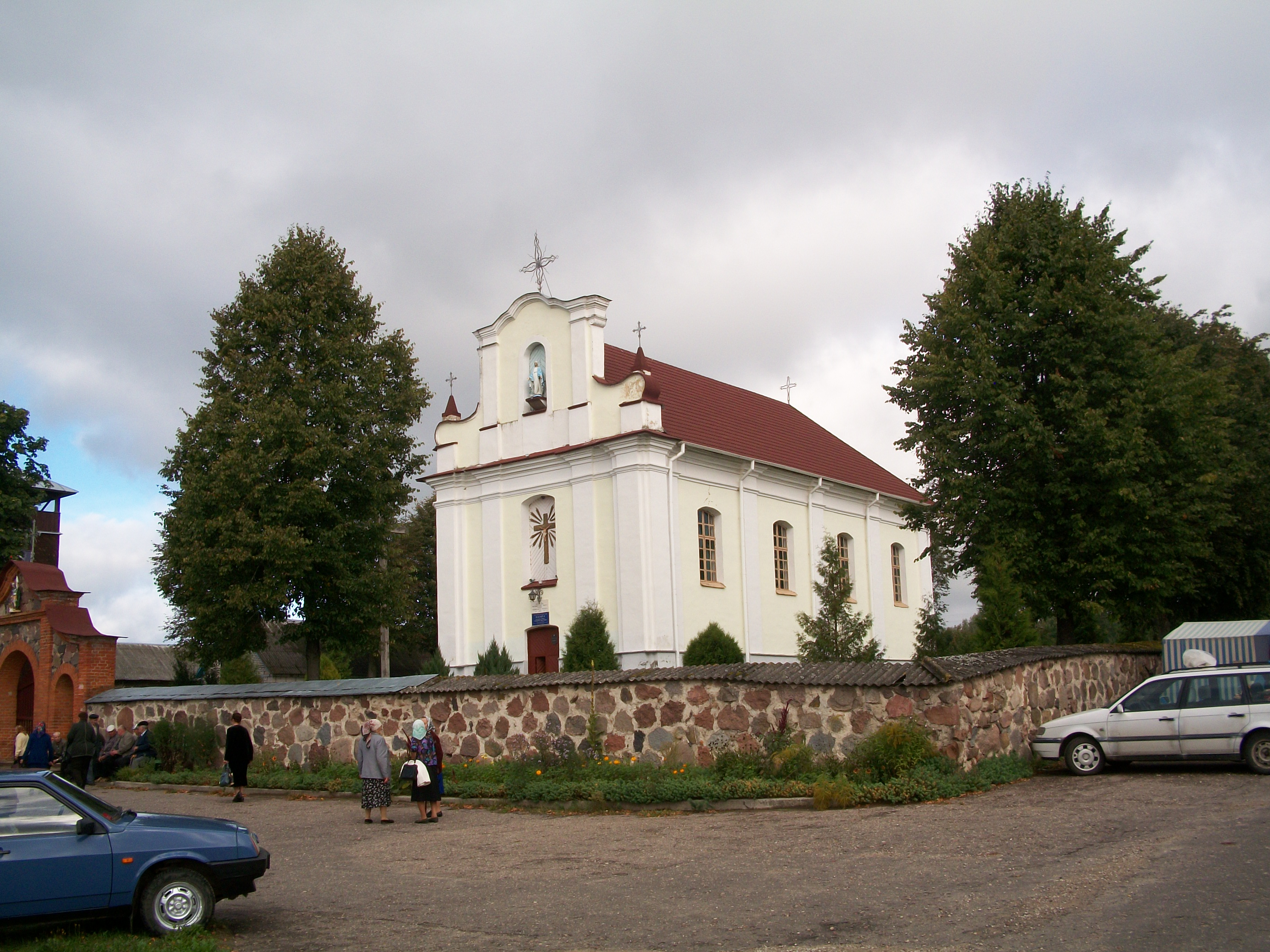 Беларуская (тарашкевіца): Касьцёл езуітаў з брамай і агароджай. в. Касьцяневічы This is a photo of Belarusian heritage monument. Reference number: 612Г000123 ( WLM)